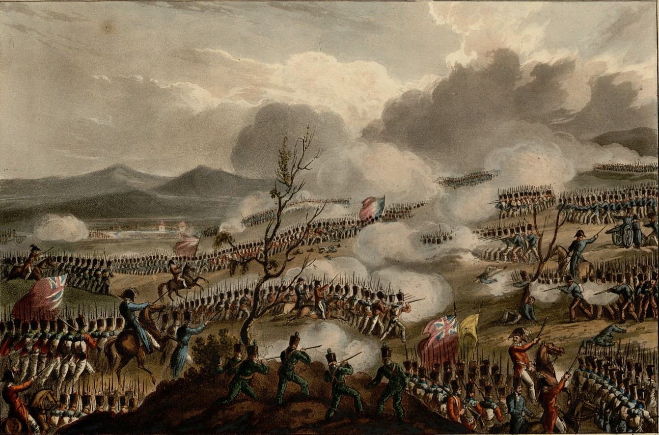 Fait partie d'un volume de gravures sur cuivre par T. Sutherland et D. Havell réhaussées à l'aquarelle. Titre gravé illustré en n. et b. Chaque gravure est suivie d'un texte explicatif. + in fine : "Contents", and "Names of Subscribers to the Martial Achievements of Great Britain and her allies". Ancely, René (1876 - 1966). Possesseur